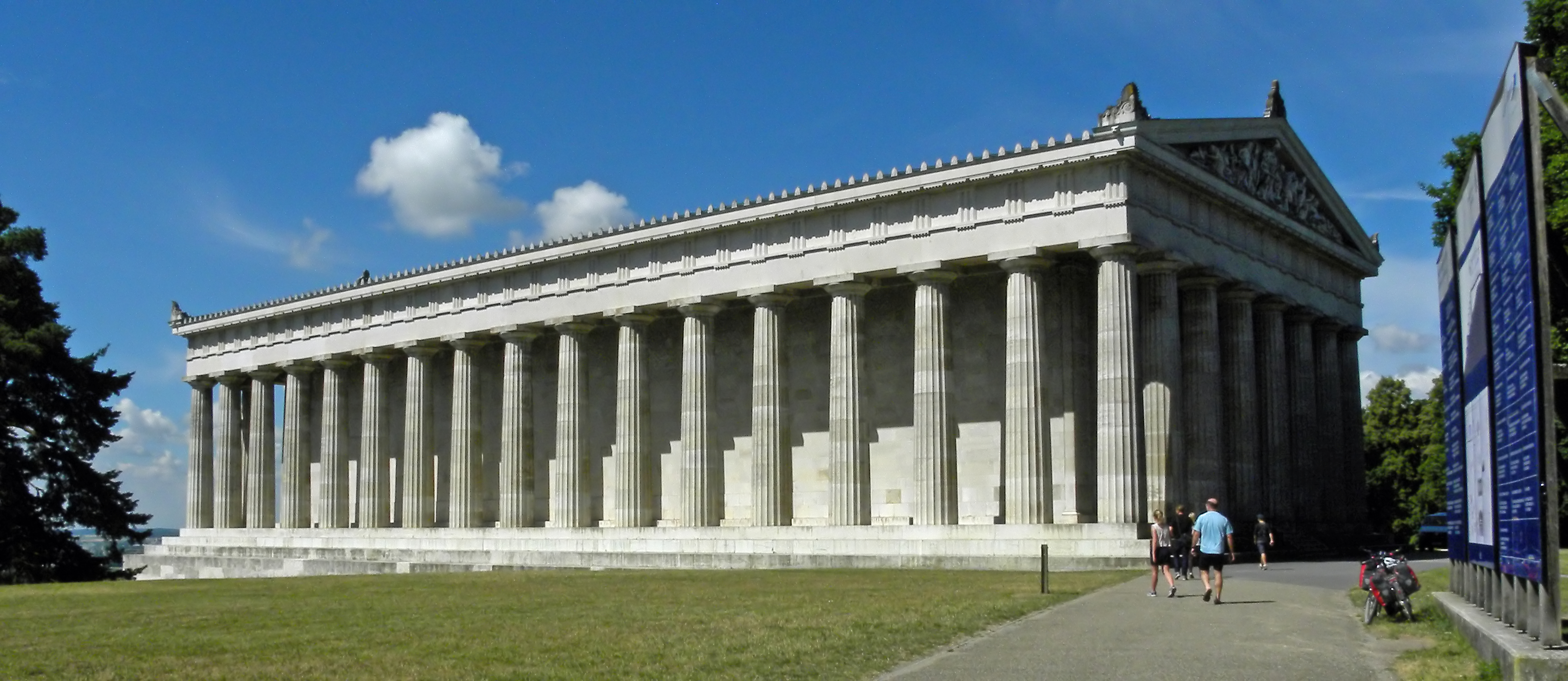 Gedenkstätte Walhalla